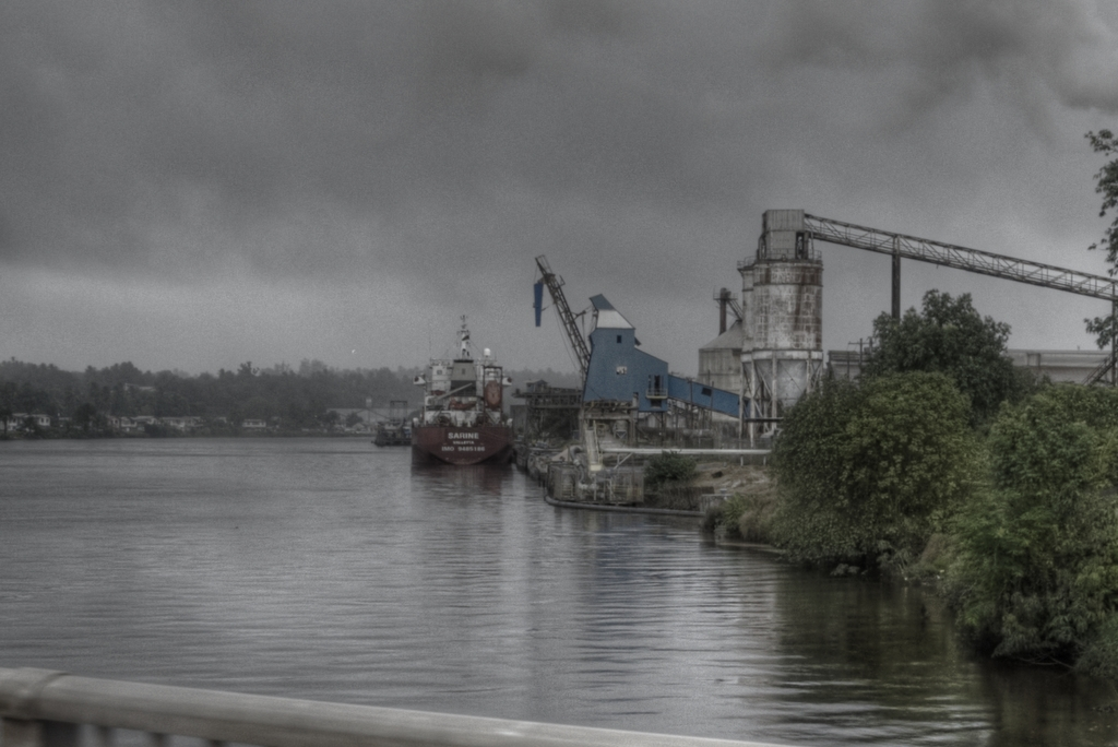 Linden Bauxite Company